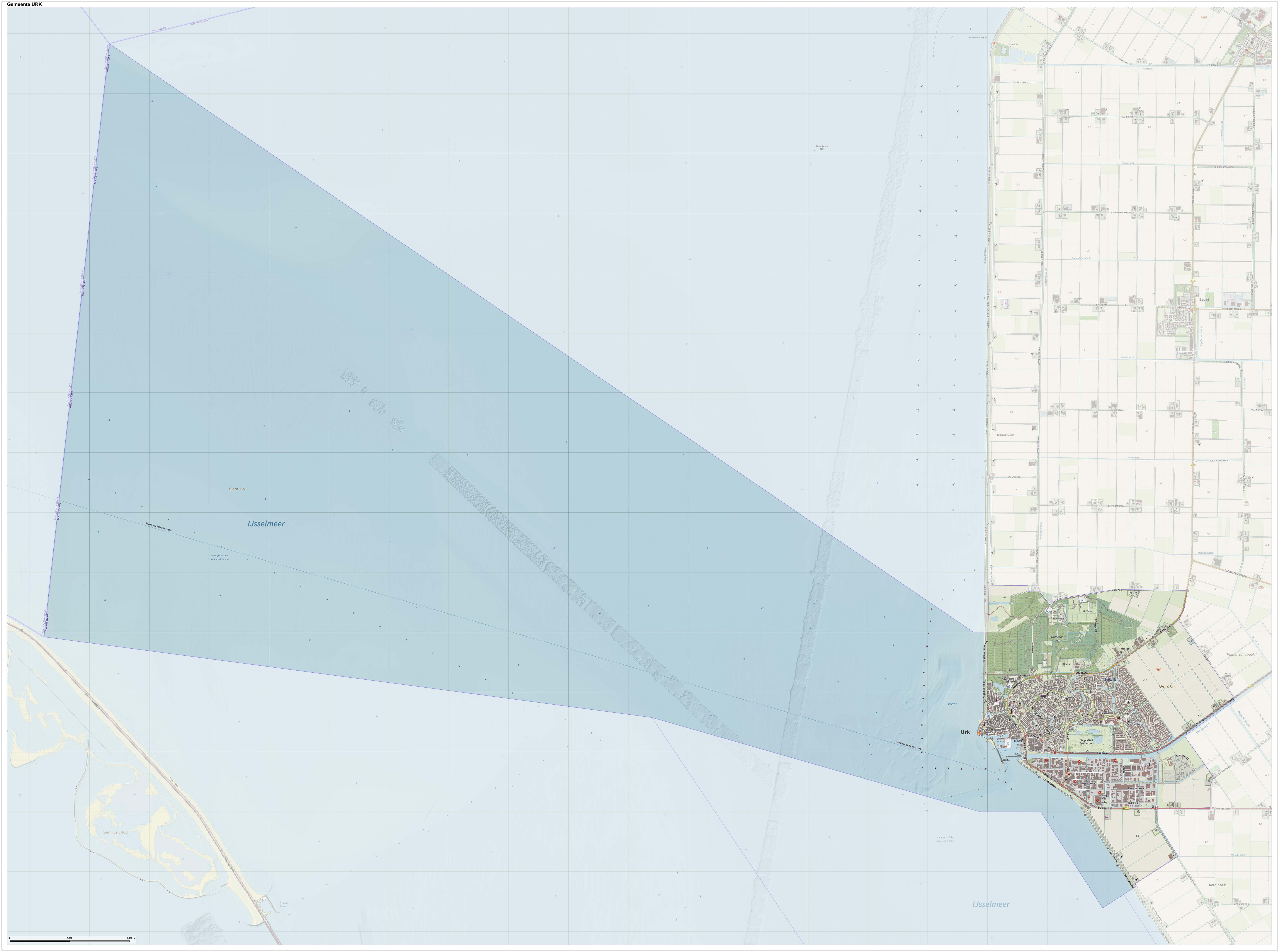 Topografische gemeentekaart. Resolutie: 400 pixels/km. Kaartbeeld samengesteld uit de open geodata van de Top10NL en Top25namen (Kadaster), Creative Commons-BY licentie. Gebouwvlakken uit open geodata BAG extract. Wegen uit de OpenStreetMap, OpenStreetMap community. Reliëfschaduw uit de Actuele Hoogtekaart AHN2. Samenstelling en kleurenschema: Jan-Willem van Aalst, met QGIS. Zie ook de Legenda.